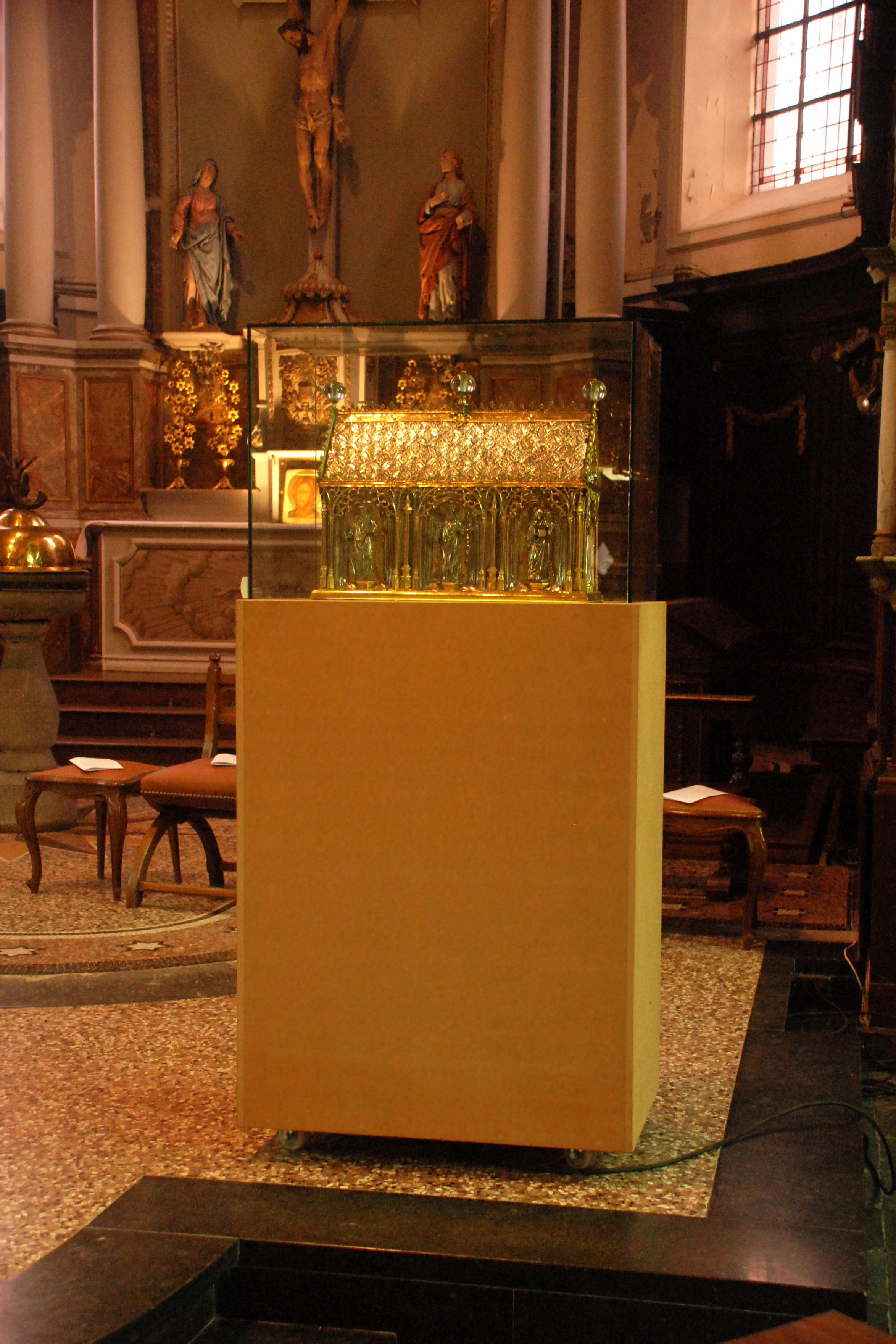 Belgique - Brabant wallon - Église de Court-Saint-Étienne